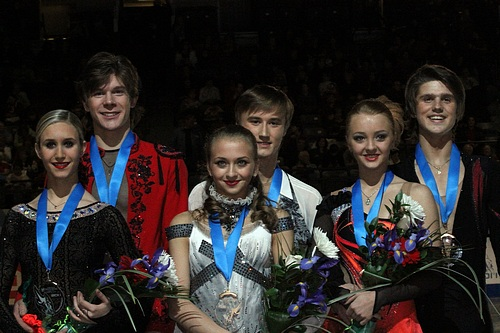 Подиум в танцах на льду на финале Гран-при среди юниоров сезона 2011-2012. Слева на право: Анна Яновская / Сергей Мозгов (2-е место), Виктория Синицина / Руслан Жиганшин (1-е место), Александра Степанова / Иван Букин (3-е место)